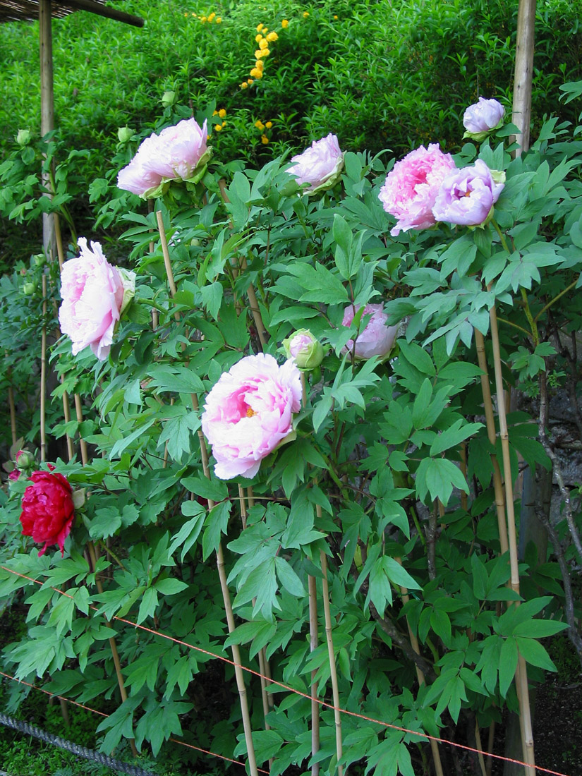 Paeonia suffruticosa at Hase-dera Sakurai Nara, Japan